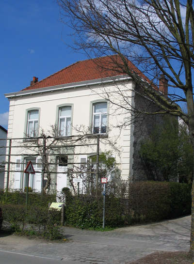 Woonhuuis van Albijn Van den Abeele in Latem, Latemstraat 12